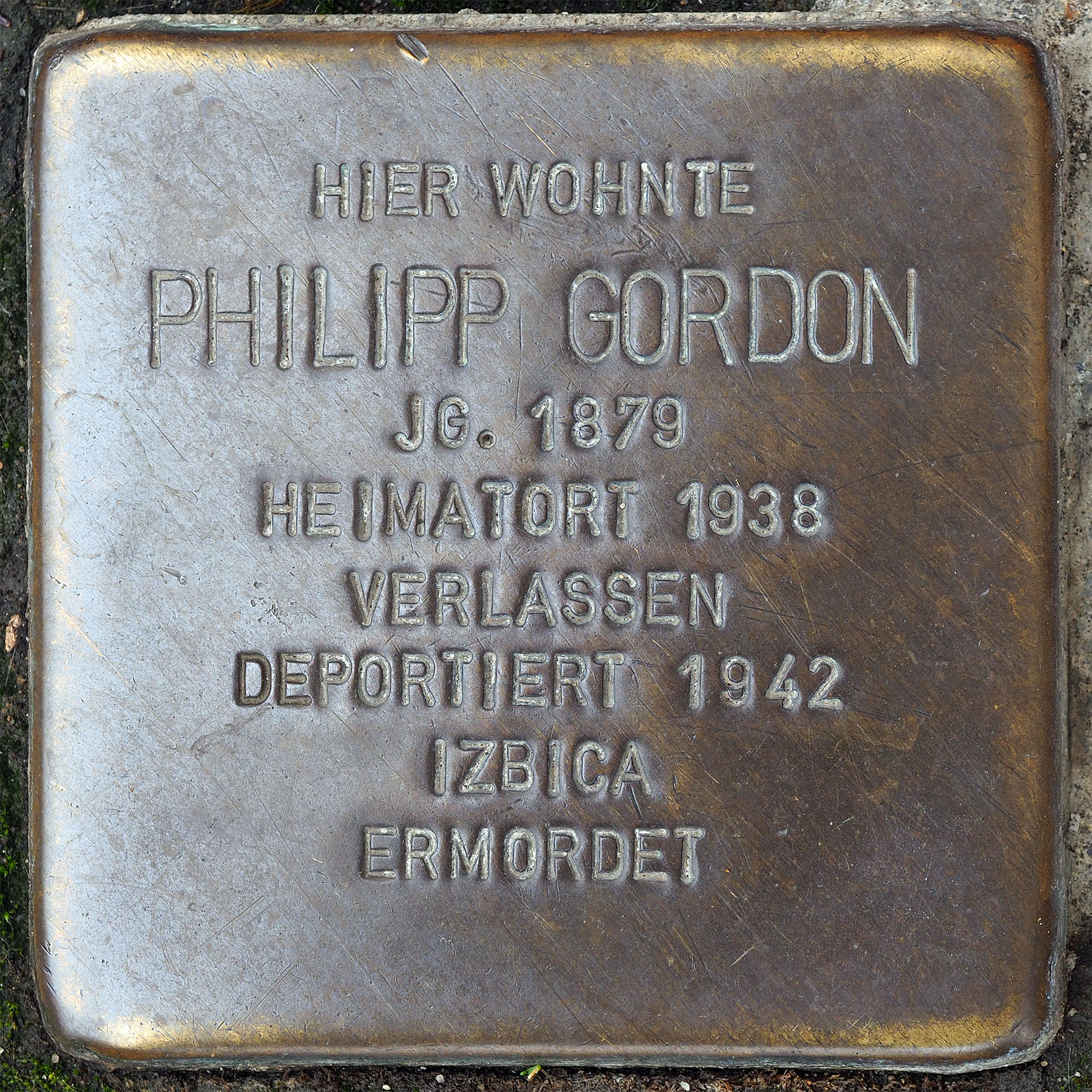 Stolpersteine GV: Gordon Philipp